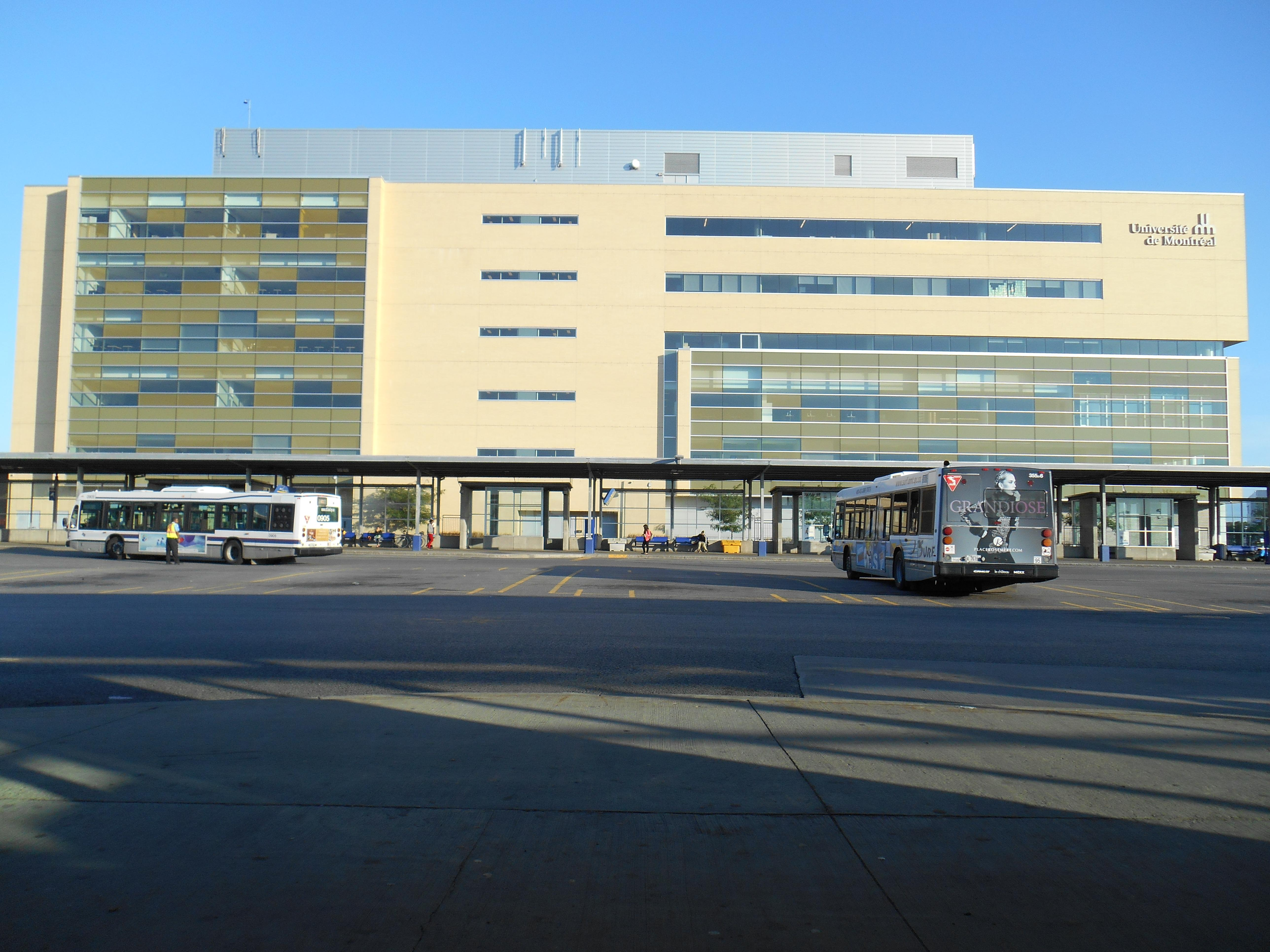 Station de métro Montmorency à Laval